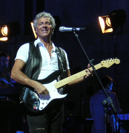 Claudio Baglioni durante una esibizione live; foto personale, concessa da Inviaggio.